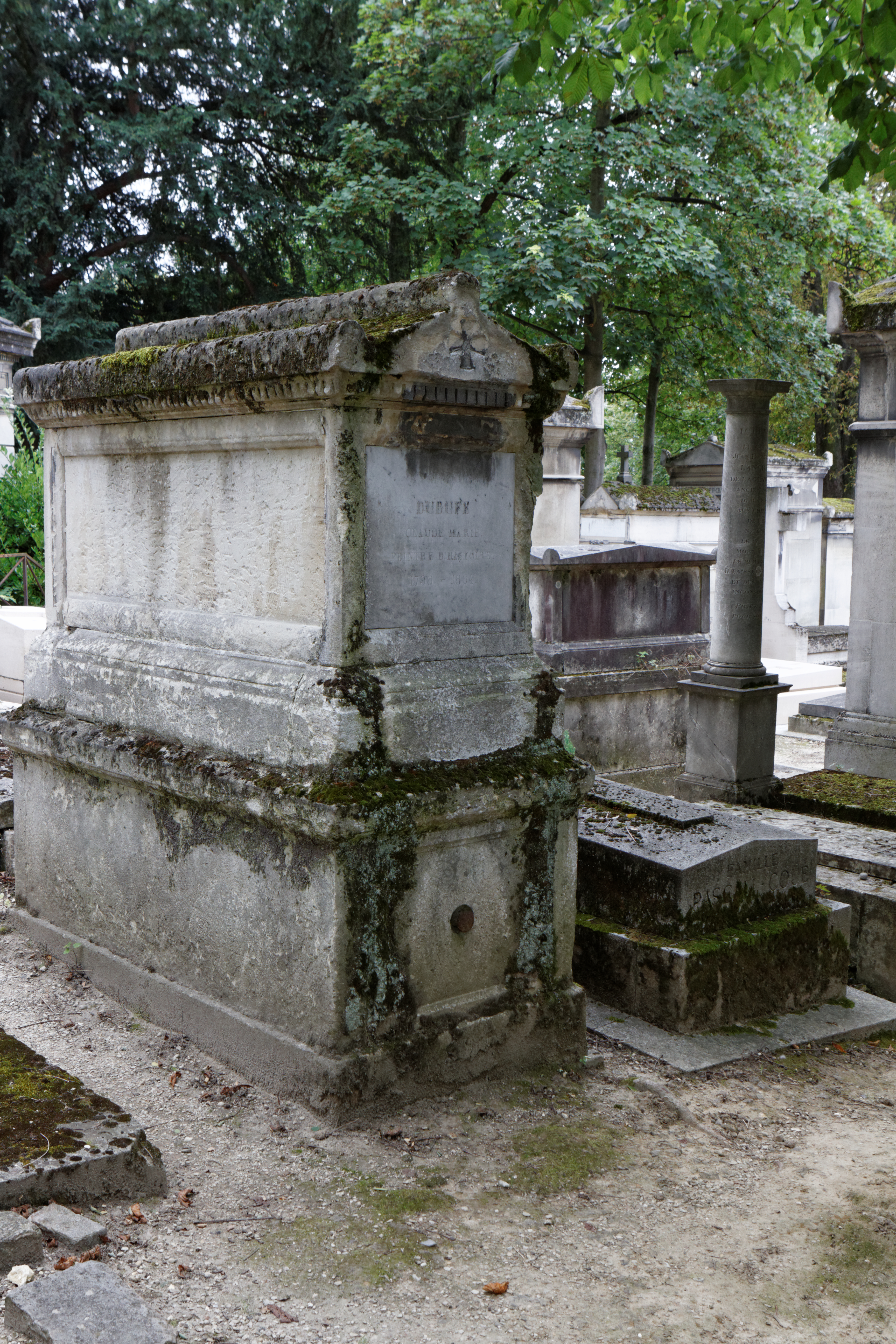 Sépulture du peintre Claude-Marie Dubufe (1790-1864).